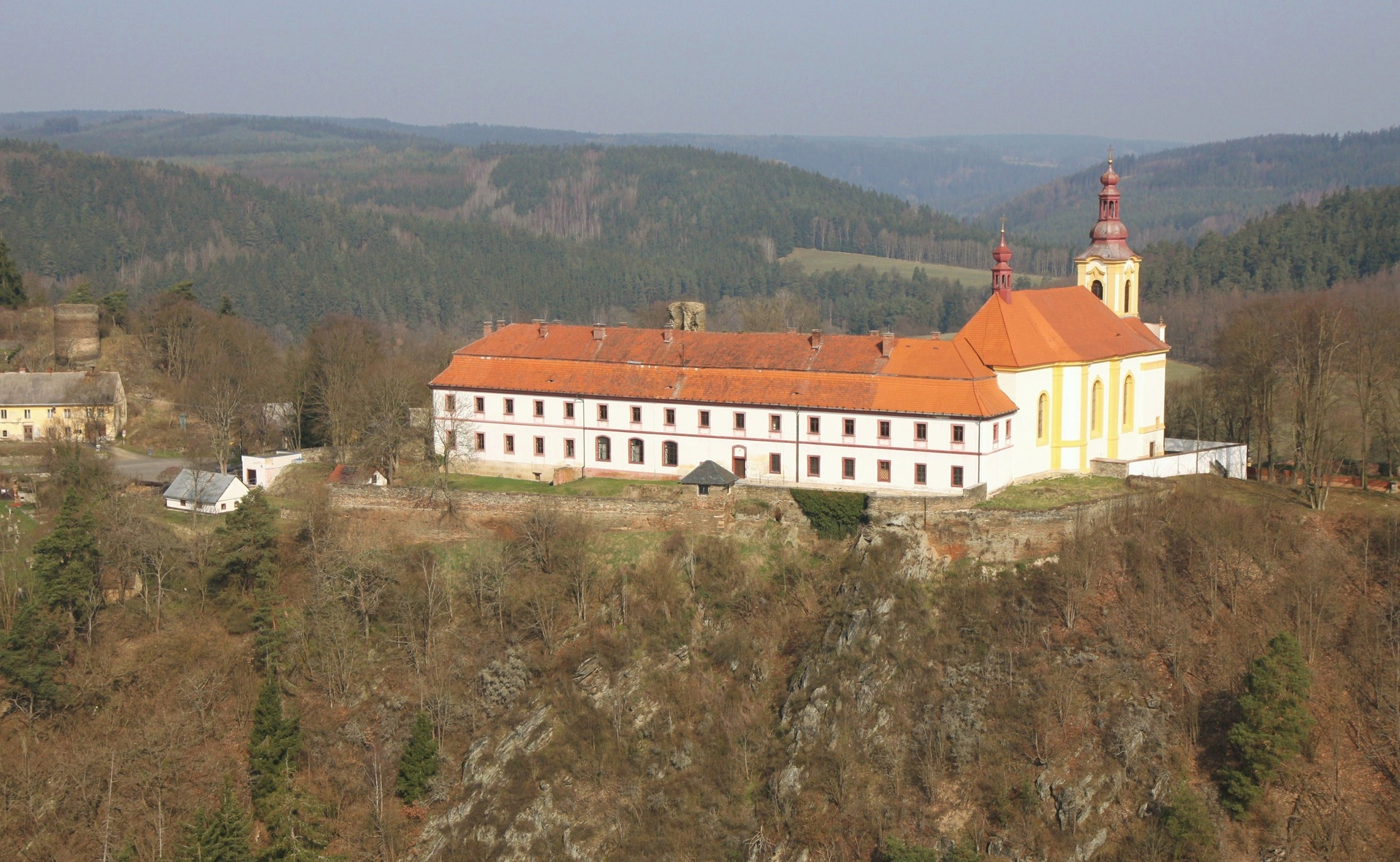 Pohled z nebe na Rabštejn nad Střelou